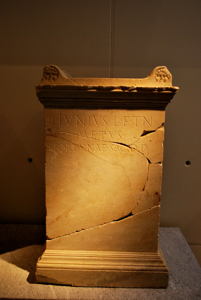 Altar de Lucius Iunius Paetus, procedente del teatro romano de Cartagena. Museo del Teatro Romano de Cartagena. AE 1992, 01077.